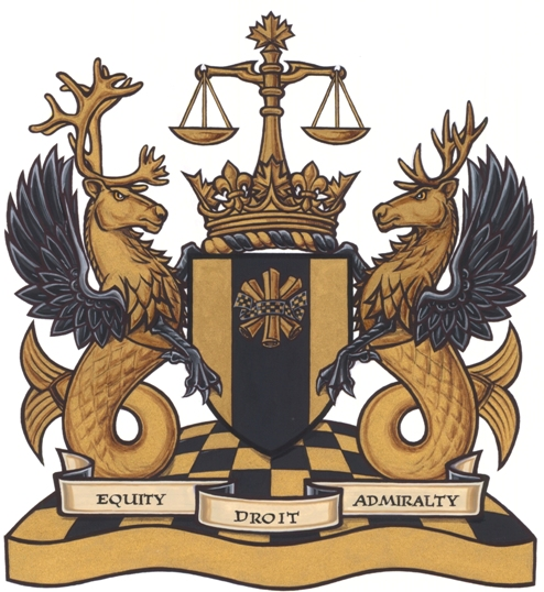 Armoiries de la Cour fédérale du Canada